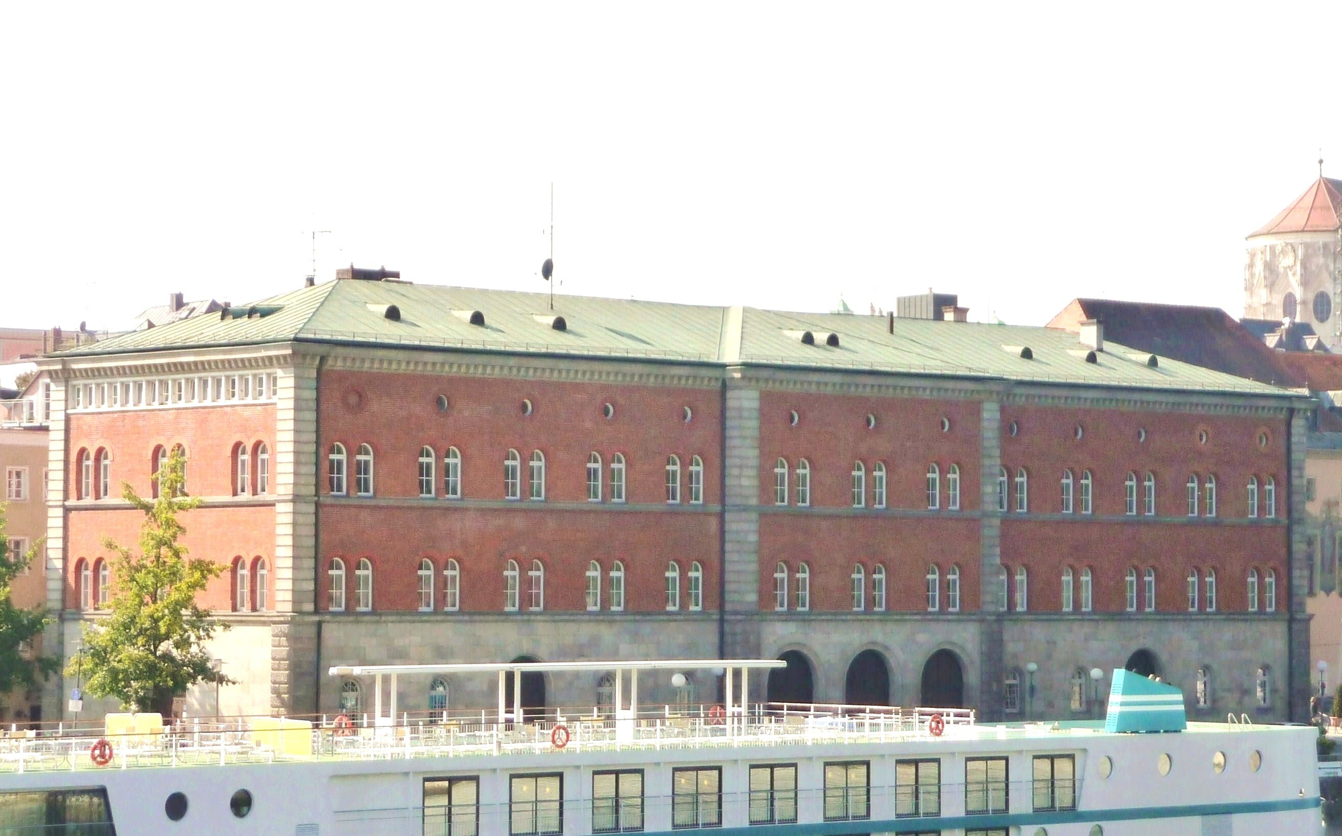 Das Gebäude des ehemaligen Hauptzollamts in Passau